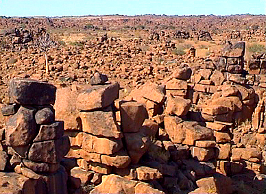 "Giant's playground", Doleritfelsen nahe der Farm Gariganus, Namibia 1998